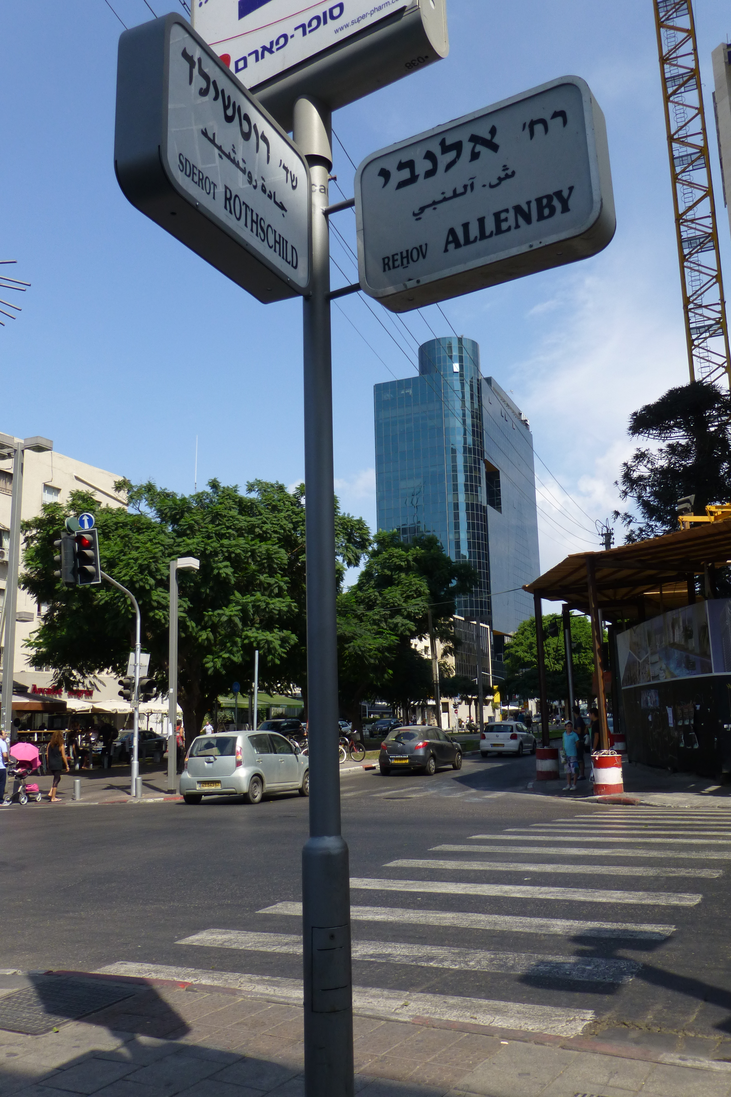 שדרות רוטשילד היו בין ארבעת הרחובות הראשונים של תל אביב (שנקראה אז "אחוזת בית"), שנחנכו לאחר רחוב הרצל (הרחוב הראשון בעיר), ובניצב אליו. הרחובות נסללו על גבי דיונות חול אשר יושרו ושוטחו, ולאורכם נבנו בתיה הראשונים של העיר. התוואי שהפך להיות השדרה היה ואדי קטן שאותו קשה היה ליישר באמצעים של אז, ואליו גם התנקזו מים רבים בחורף. בשל כך הוחלט למלאו בחול להשאירו כשטח פתוח שעליו לא ייבנו בתים אלא בצדיו, כרחוב עירוני רחב יותר. בט"ו בשבט ה'תר"ע (1910) החלו נטיעות בשטח פתוח זה, במטרה להפוך את הרחוב לשדרה הראשונה של העיר. חודשים אחדים לאחר מכן, בדצמבר 1910, החליט ועד אחוזת בית לקרוא לשדרה על שם הברון רוטשילד, ולמנות את מרדכי בן הלל הכהן ואת מאיר דיזנגוף להודיע על כך באופן רשמי לברון. אנשי אחוזת בית ראו בשדרה את תחילתה של שדרה מפוארת כדוגמת הבולווארים המפוארים של פריז.